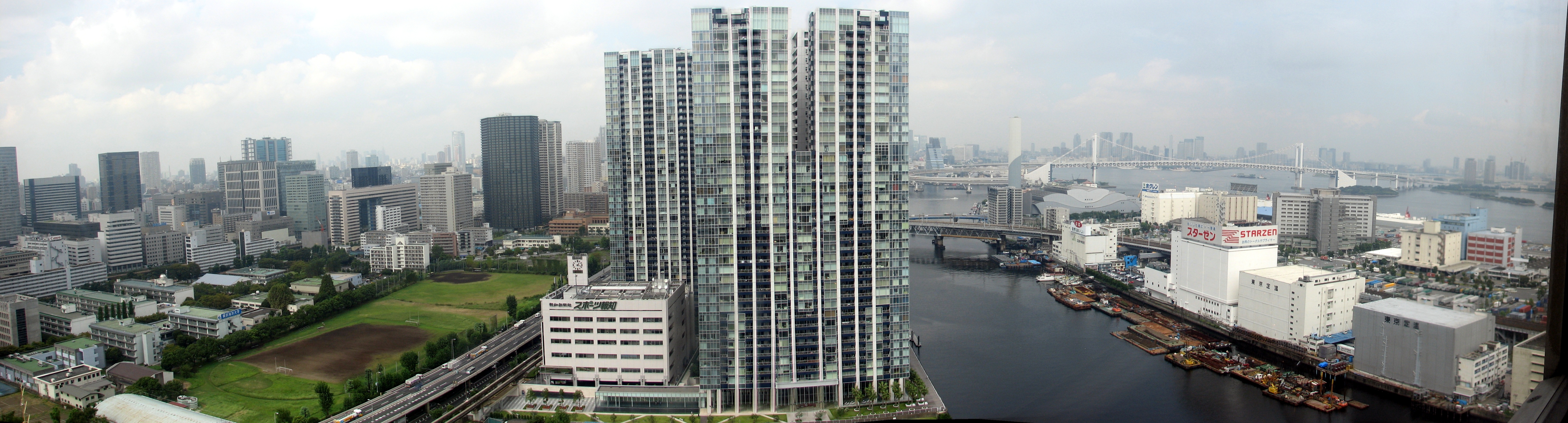 Blick aus dem Seafort Hotel auf Tennozu Isle in Shinagawa, Tokyo, Japan